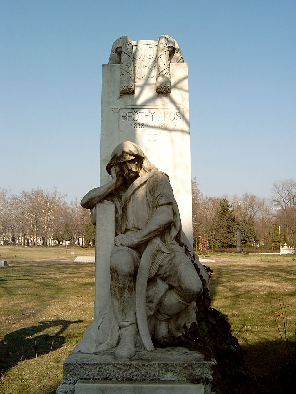 Beöthy Ákos sírja Budapesten. Zala György (1858–1937) alkotása (1906). Kerepesi temető: 28-ds.-41.